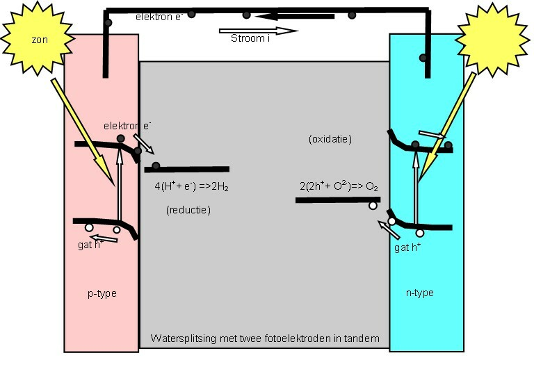 schema van een natte cel met twee foto-elektroden eigen tekening